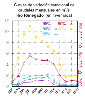 Curvas de variación estacional del río Renegado en Invernadero. # Comisión Nacional de Riego # DIAGNÓSTICO ACTUAL DEL RIEGO Y DRENAJE EN CHILE Y SU PROYECCIÓN. Informe final.Diagnóstico de riego y drenaje VIII Región, Anexo 1 # Santiago de Chile # Febrero 2003 # url: # urlarchivo: # Caudales medios mensuales Estación 81 mes 95% 90% 85% 50% 20% abr 0.300 0.380 0.440 0.900 1.660 may 0.230 0.380 0.520 1.920 5.270 jun 0.730 1.110 1.470 4.360 9.490 jul 0.770 1.300 1.800 5.620 11.020 ago 1.140 1.630 2.050 4.920 8.970 sep 1.110 1.600 2.020 4.760 8.340 oct 1.230 1.770 2.220 4.780 7.310 nov 0.340 0.750 1.170 4.100 6.420 dic 0.150 0.320 0.510 2.050 3.860 ene 0.170 0.250 0.330 0.860 1.710 feb 0.100 0.200 0.300 1.100 1.890 mar 0.170 0.270 0.370 1.040 1.860